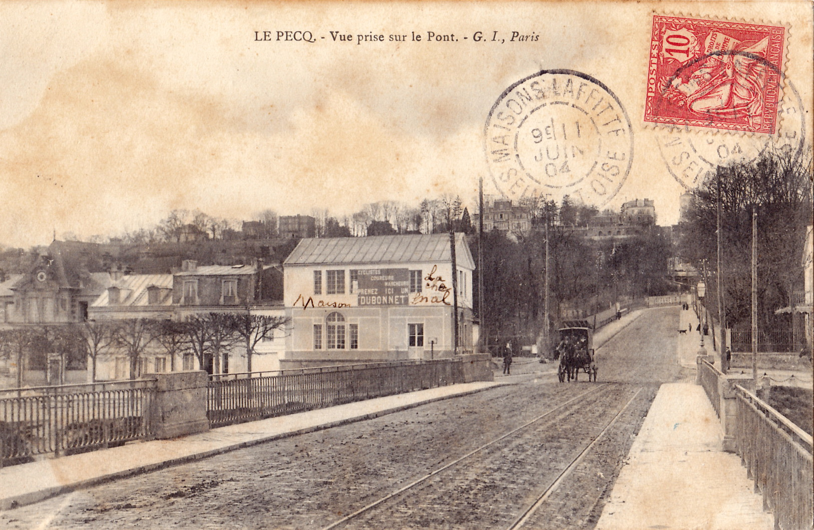 Carte postale ancienne éditée par GI : LE PECQ - Vue prise sur le premier Pont, antérieur au pont Georges-Pompidou (1963).